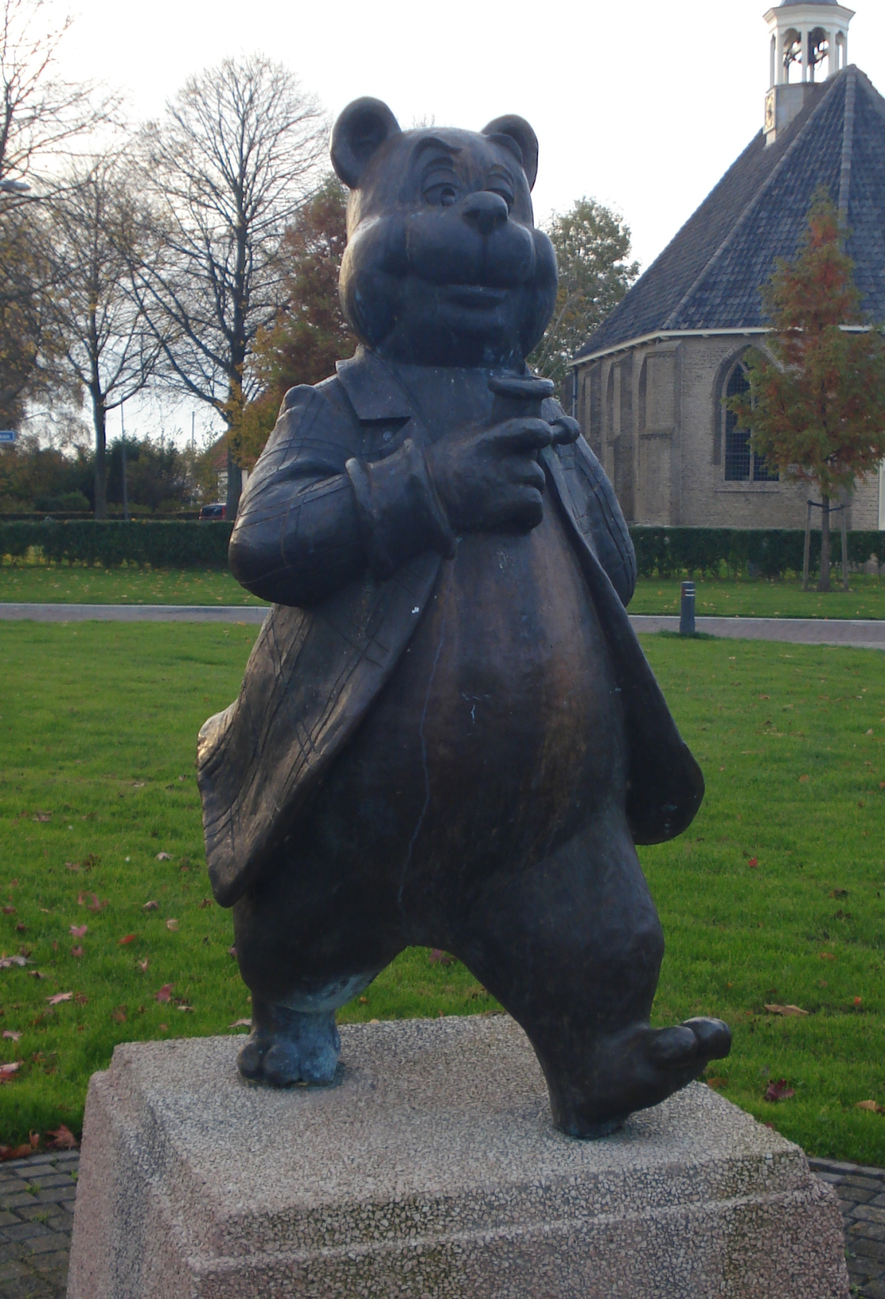 Goeree-Overflakkee, Den Bommel, Kon. Emmaplein. Kunstwerk "Olivier B. Bommel" van Harr Wiegman. The Netherlands. The photographical reproduction of this work is covered under the article 18 of the Dutch copyright law, which states that “it is not an infringement of copyright to reproduce and publish pictures of a work, as meant in article 10, first paragraph, under 6°[1] or of an architectural work as meant in article 10, first paragraph, under 8°[2], which are made to be permanently located in a public place, as long as the work is depicted as it is located in the public space. Where incorporation of a work in a compilation is concerned, not more than a few of the works of the same author may be included”. [1] drawings, paintings, works of architecture and sculpture, lithographs, engravings and the likes [2] drafts, sketches and three-dimensional works relating to architecture, geography, topography or other sciences Note that photographs are not included in Item 6. They are separately listed at Item 9 and are therefore not covered by FOP. See COM:CRT/Netherlands#Freedom of panorama for more information. .